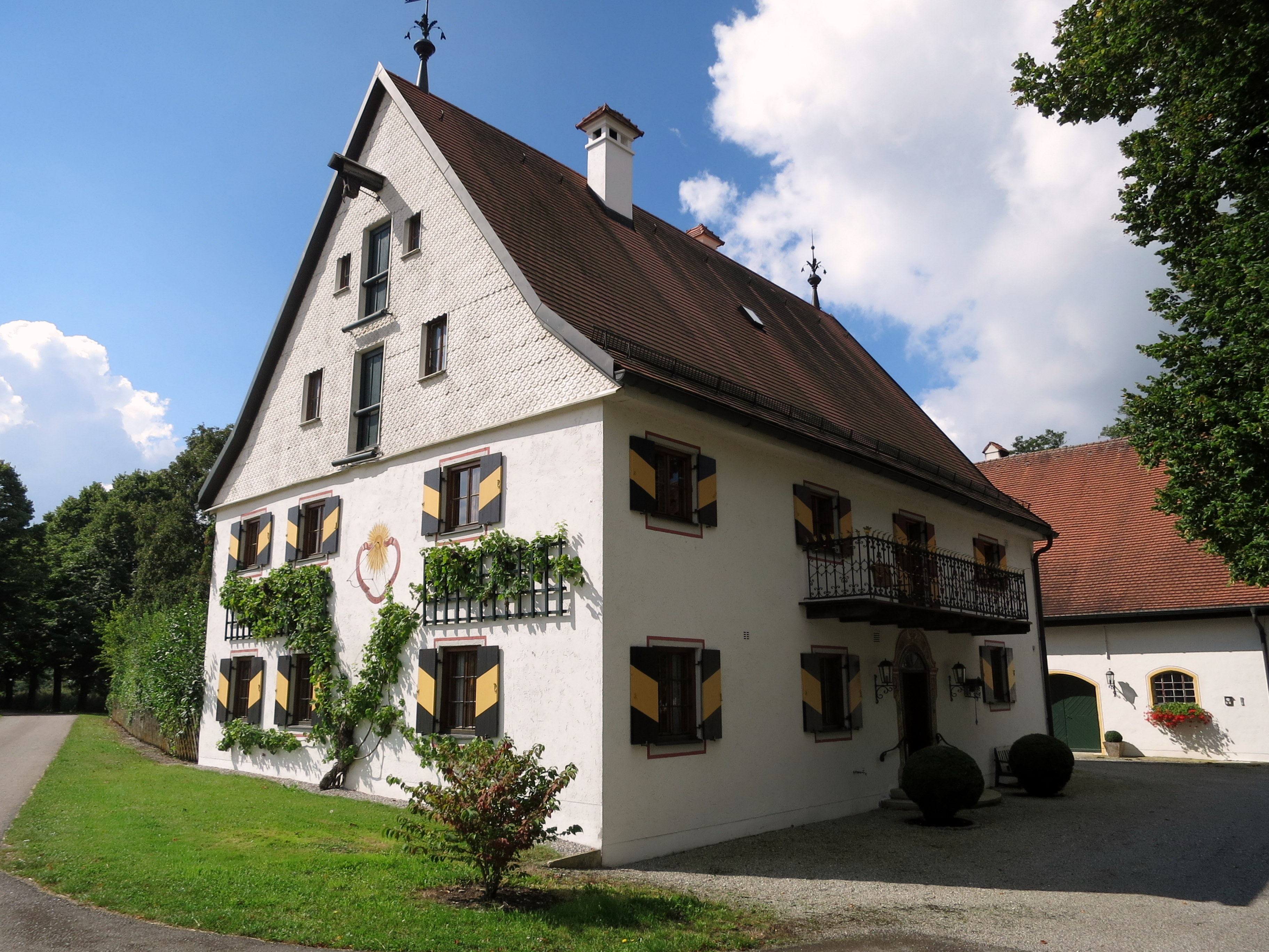 Das Remontegut Zellhof liegt sehr idyllisch im Ampertal bei Schöngeising